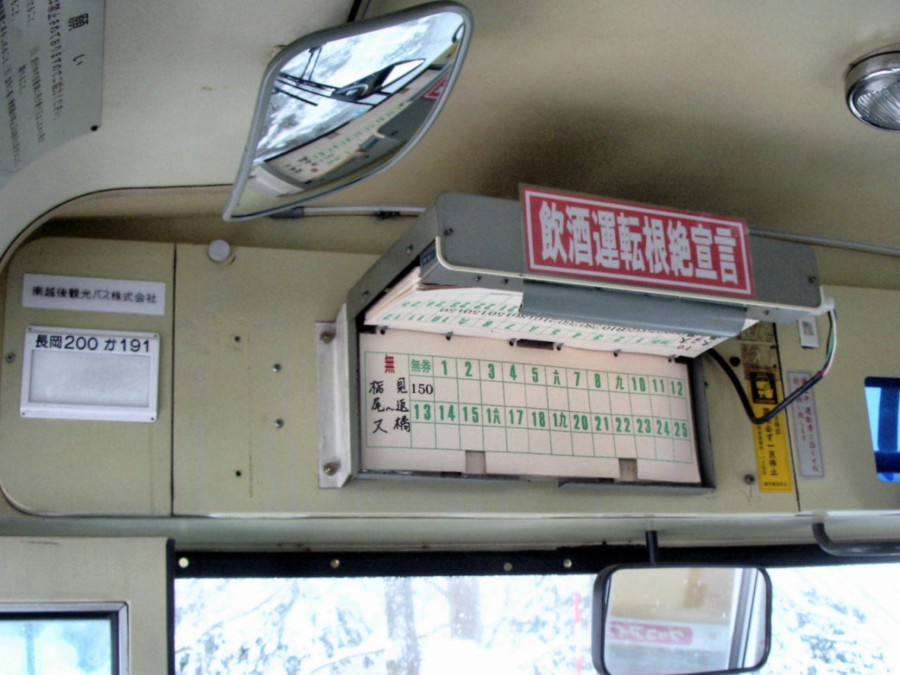 南越後観光バスの運賃表示機。以前は越後交通でも使用されていた。（原典の記載による）